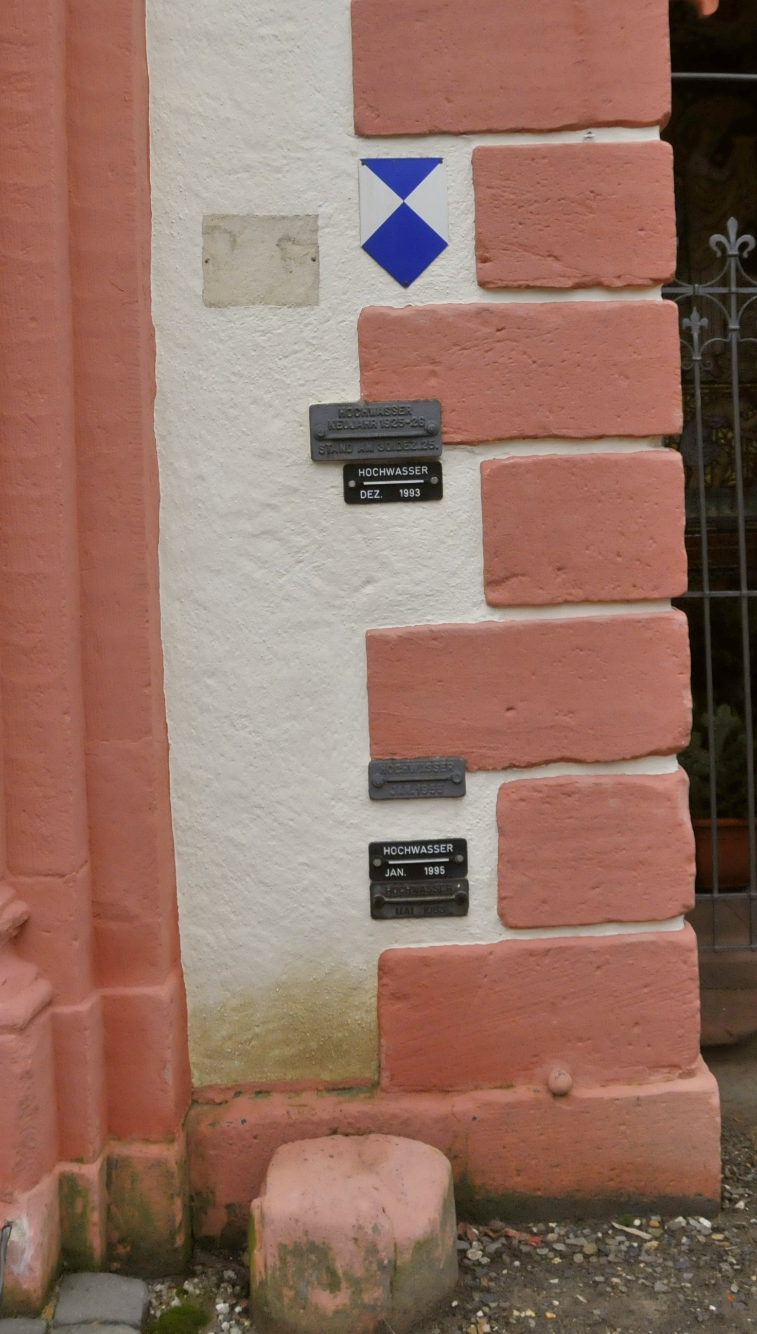 Piesport, Michaelskirche